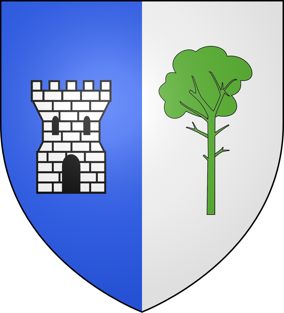 Blason de la ville de La Tour-du-pin (Isere) : parti, en 1 d'azur à la tour maçonnée d'argent et en 2 d'argent au pin de sinople